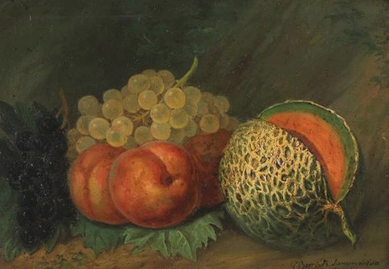 Natura morta, olio su tela, coll. privata